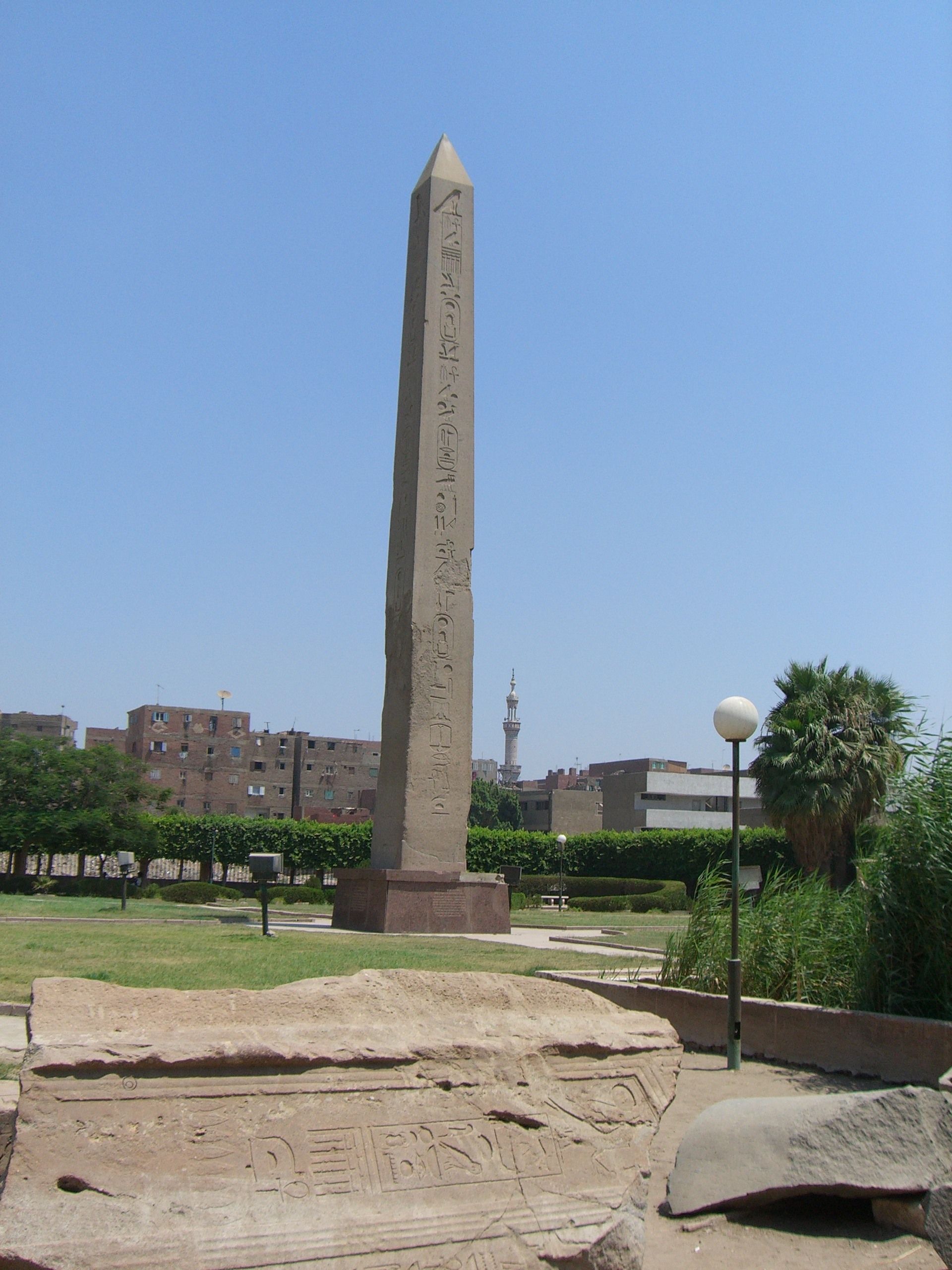 Obélisque de Sésostris Ier - XIIe dynastie - Moyen Empire user:Neithsabes alias Sebi sur